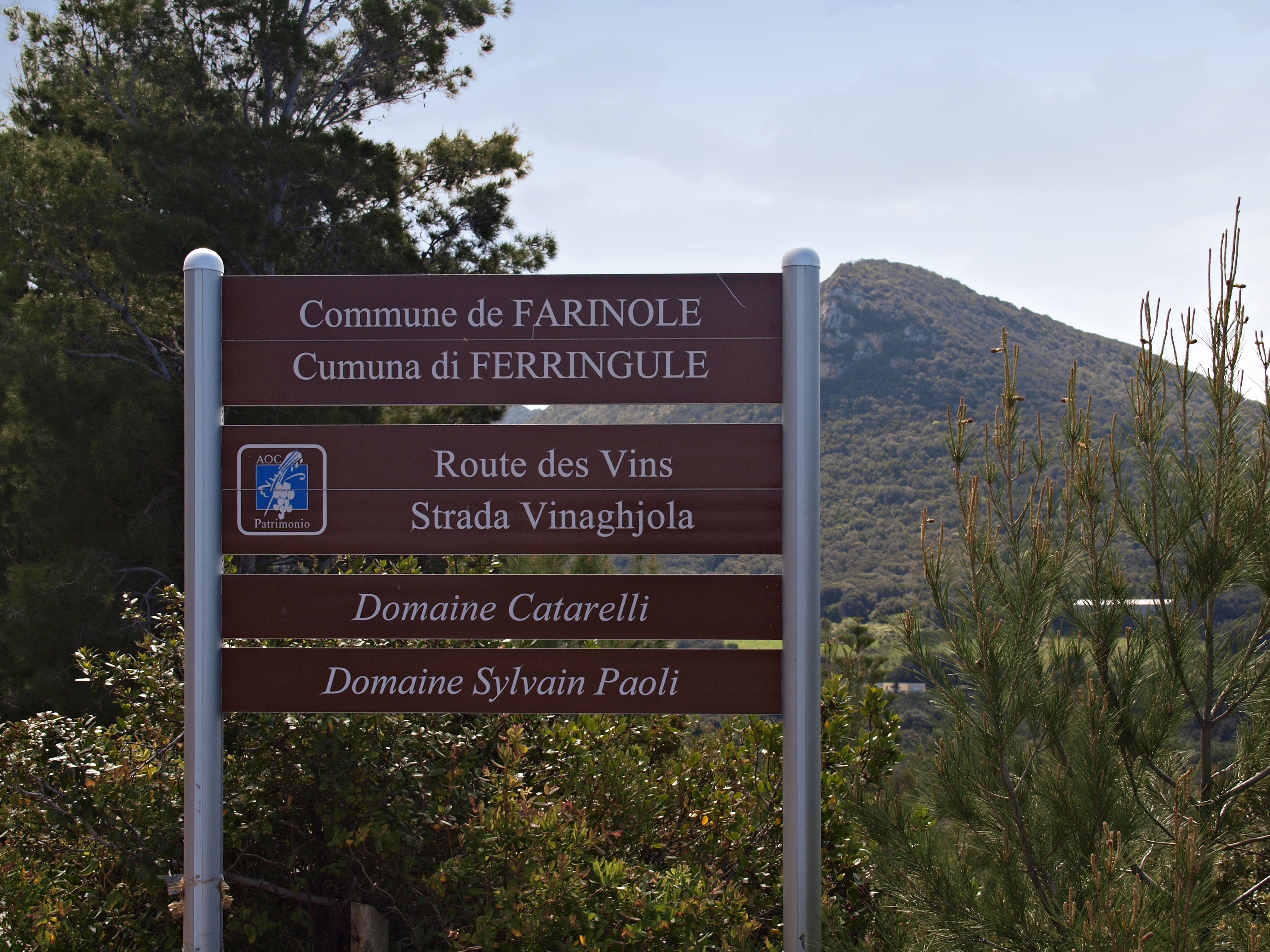 Farinole (Corsica) - Route des Vins